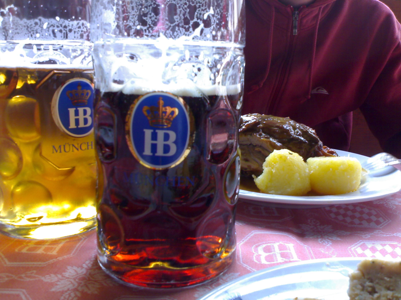 Birre HB